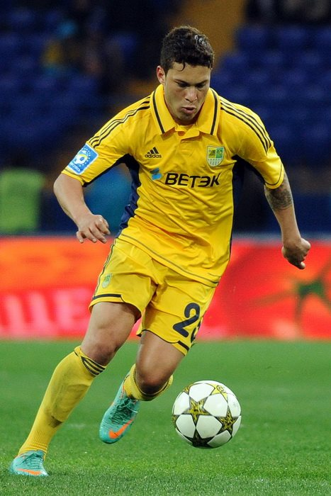 Металлист 3:1 Черноморец